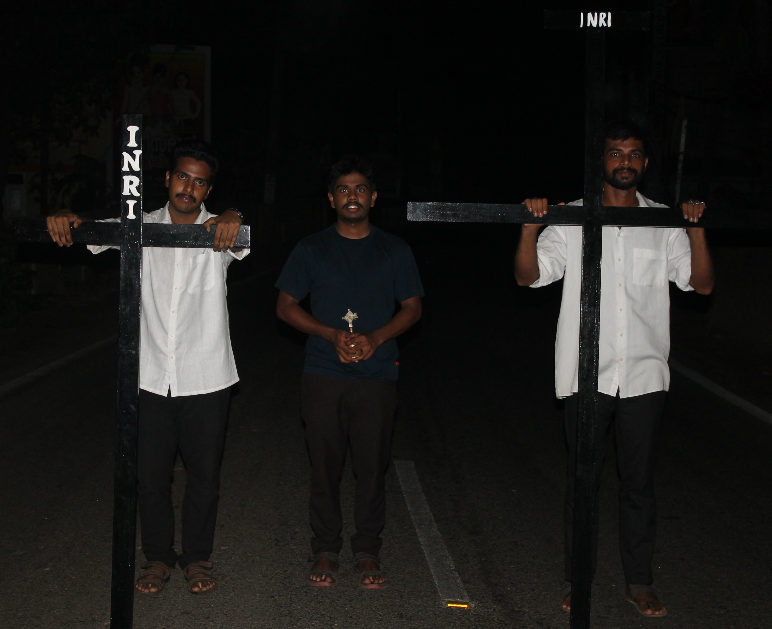 ദേവാസ്തവിളി - പതിനാറാം നൂറ്റാണ്ടുമുതൽ കേരളത്തിന്റെ തീരദേശങ്ങളിൽ സജീവമായി നിലനിന്നിരുന്നതും പീന്നീട് ശോഷിച്ചതും ഇപ്പോൾ തിരിച്ചുവരവിന്റെ പാതയിലുള്ളതുമായ അനുഷ്ഠാനാകർമം, നോമ്പിന്റെ ആദ്യദിനം മുതൽ ഈസ്റ്റർ വരെ നീളുന്ന പൗരാണിക ക്രൈസ്തവ ആചാരം